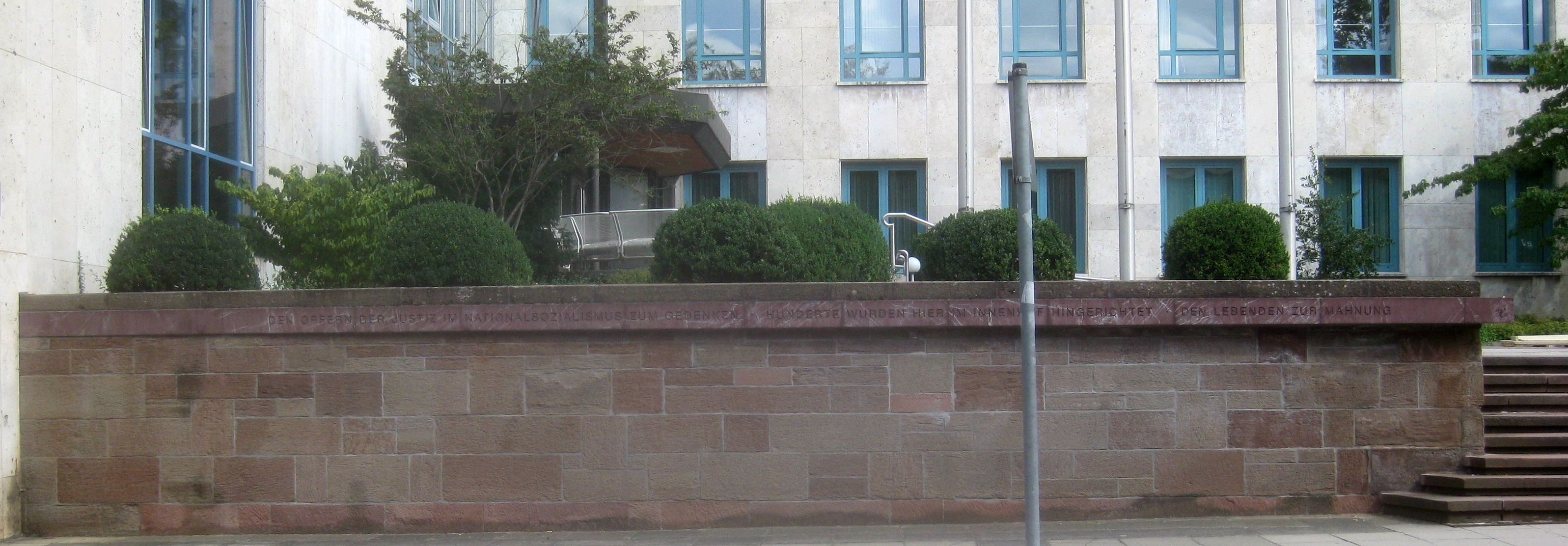 Mahnmal für die Opfer der nationalsozialistischen Justiz, Inschriftenband "DEN OPFERN DER JUSTIZ IM NATIONALSOZIALISMUS ZUM GEDENKEN · HUNDERTE WURDEN HIER IM INNENHOF HINGERICHTET · DEN LEBENDEN ZUR MAHNUNG", 1994, Landgericht, Stuttgart, Urbanstraße 20.